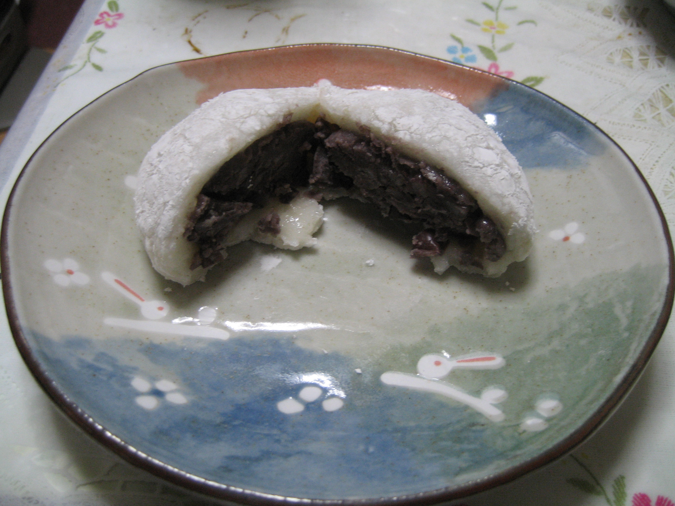 塩あんびん（塩あんが見える状態で撮影）